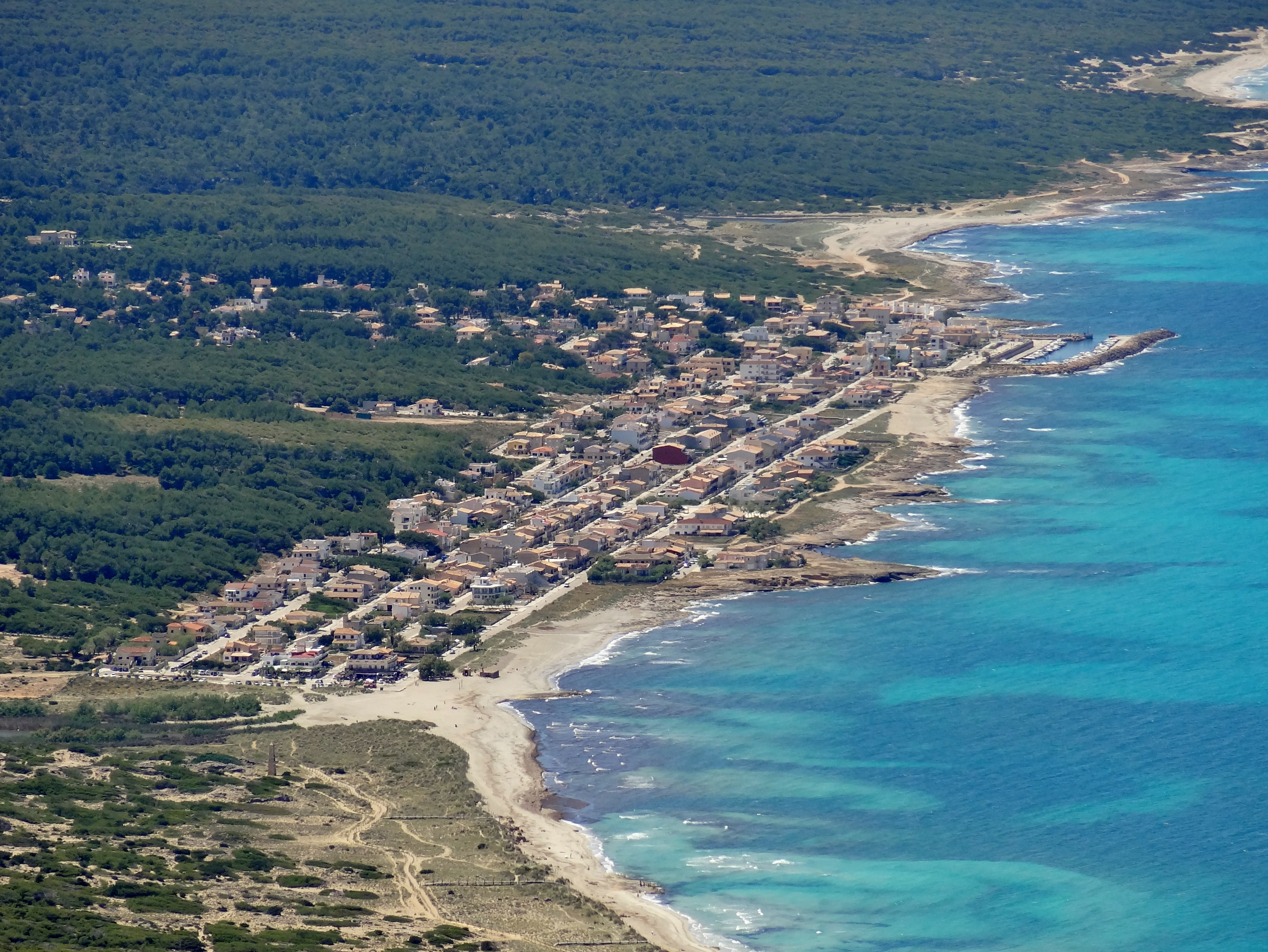 Son Serra de Marina in der Gemeinde Santa Margalida, Mallorca, Spanien